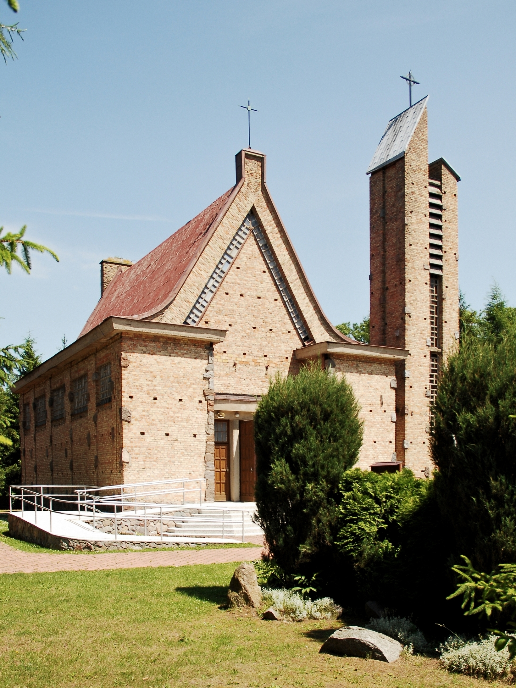 Kościół pw. Świętej Trójcy w Bulkowie (województwo mazowieckie).